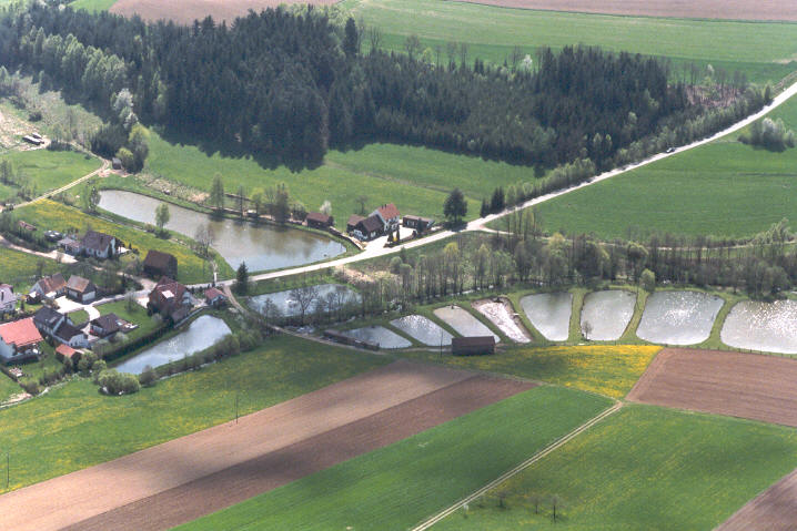 Blick auf die Sägmühle bei Lampenricht (Gemeinde Gleiritsch), die Fischteiche rechts wurden während der Flurbereinigung in der Gemeinde Gleiritsch (ab 1969) angelegt.